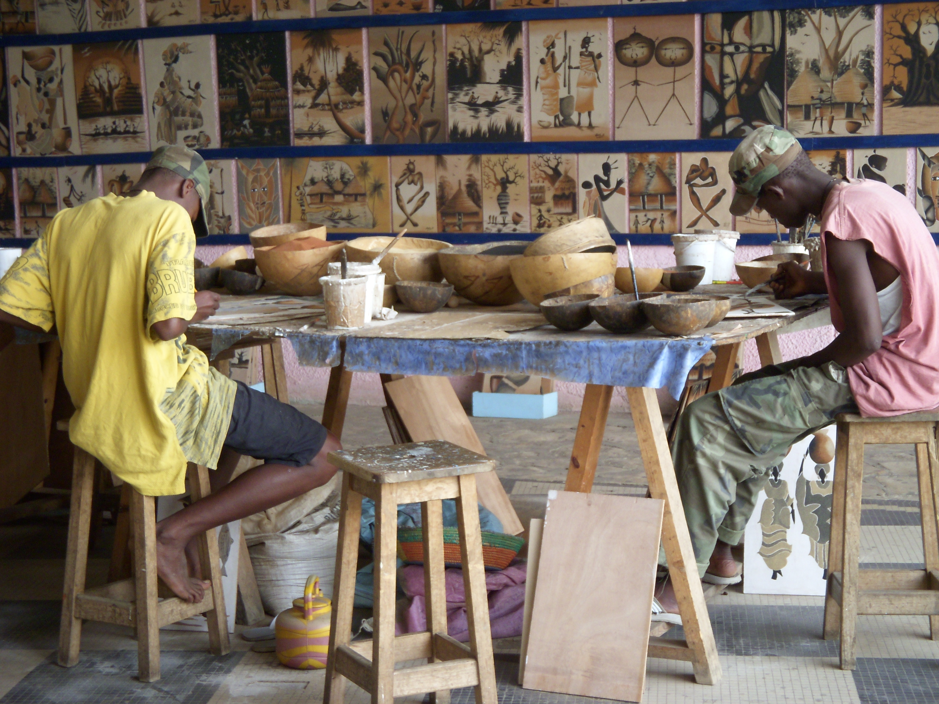 Atelier de peinture au sable à Dakar, Sénégal